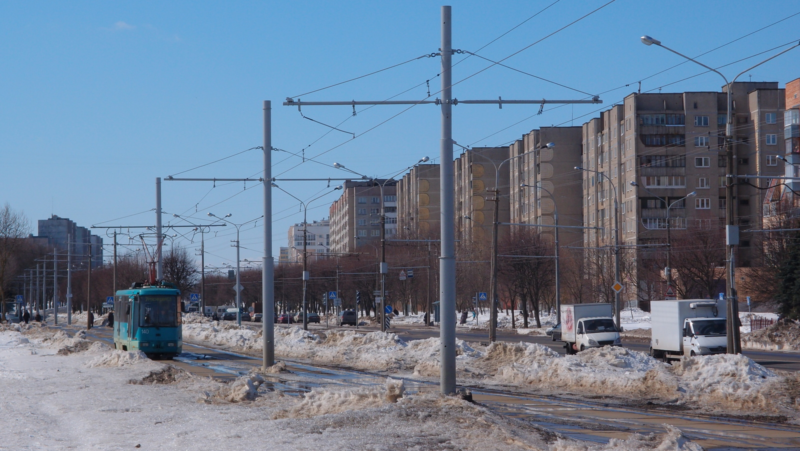 вуліца Пляханава. vulica Pliachanava